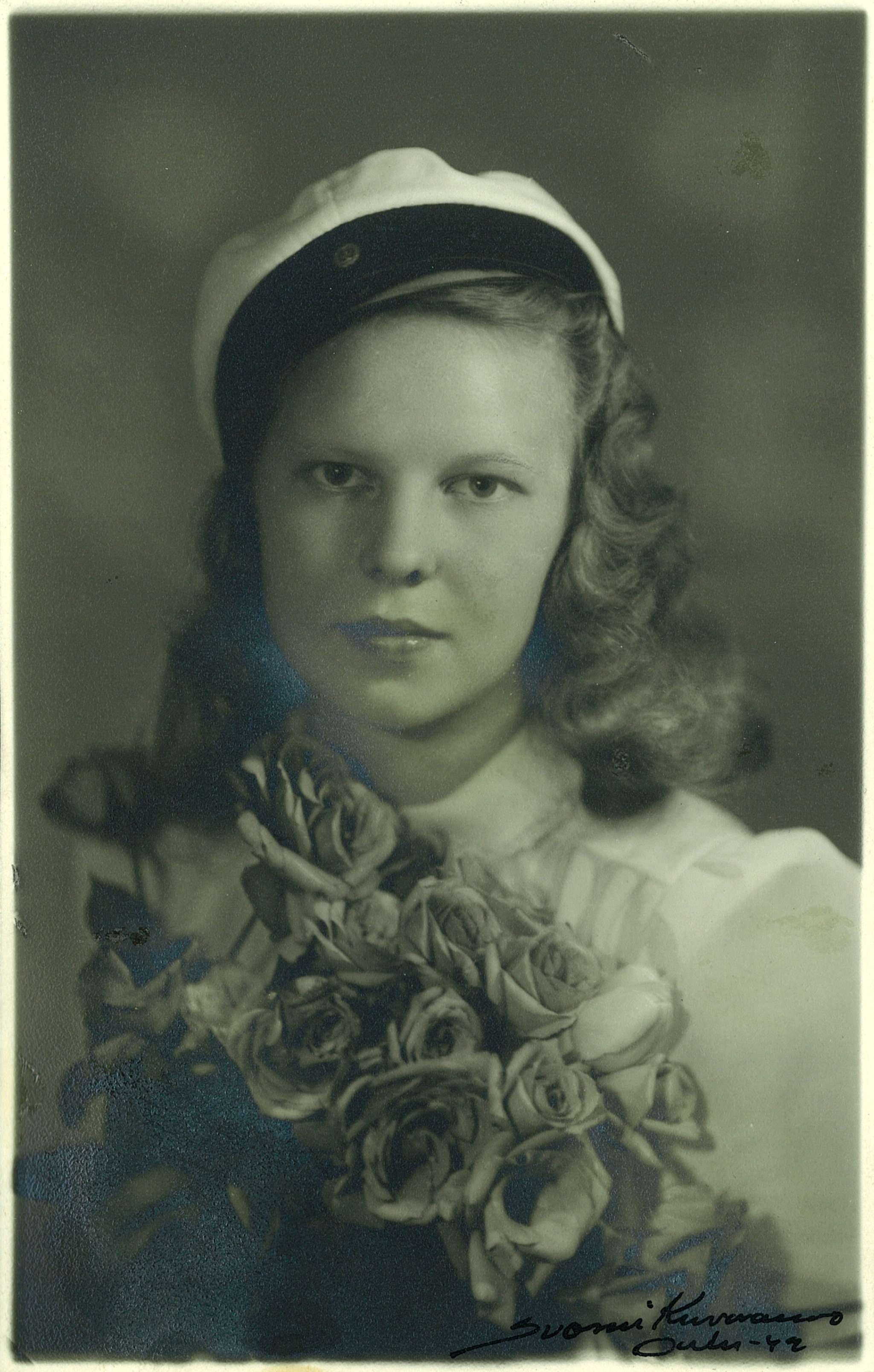 Hilkka Inkala, ylioppilas 1942